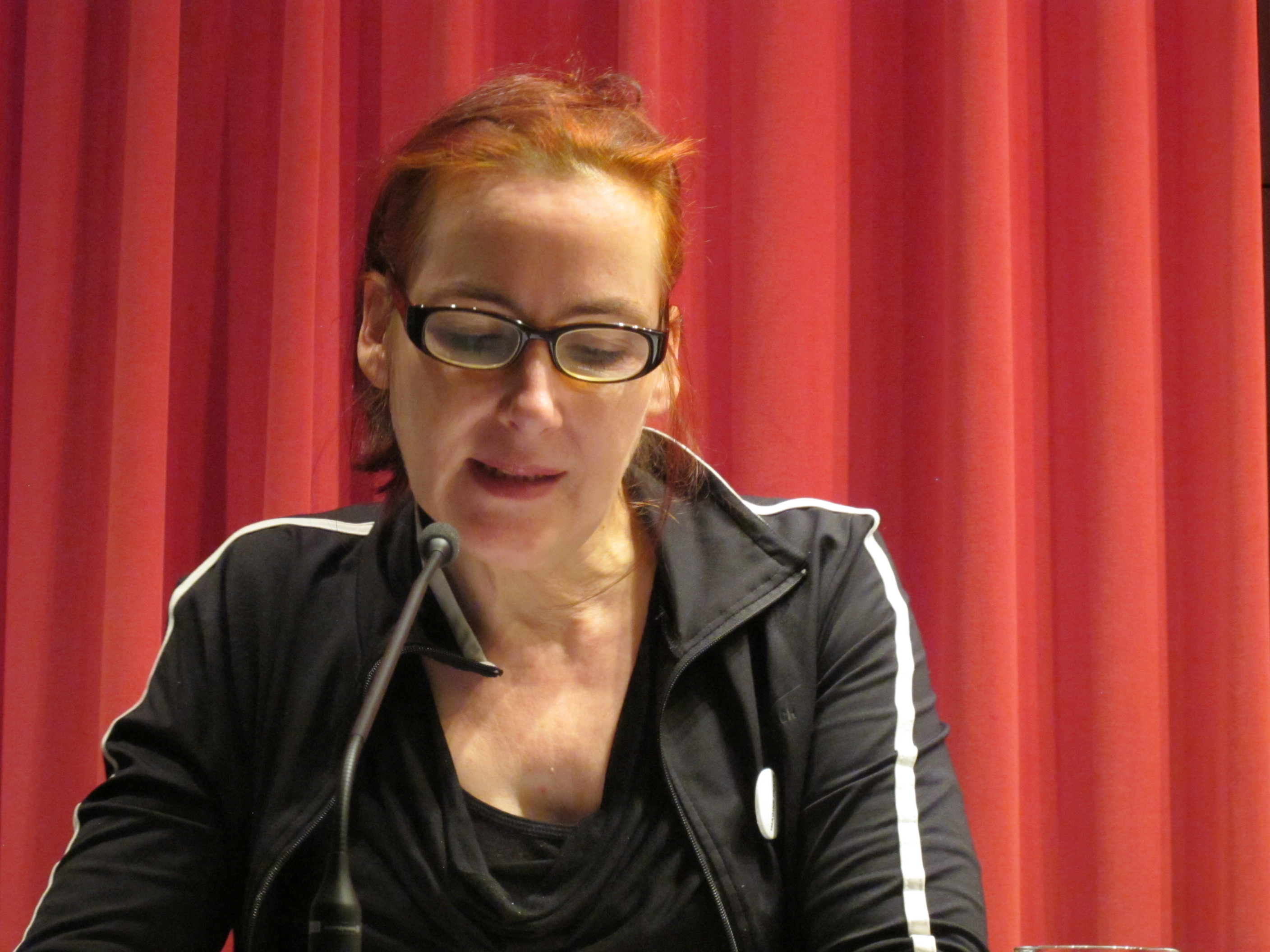 Augusta Laar bei der Präsentation von Außer.dem Nr 21 im Lyrikkabinett